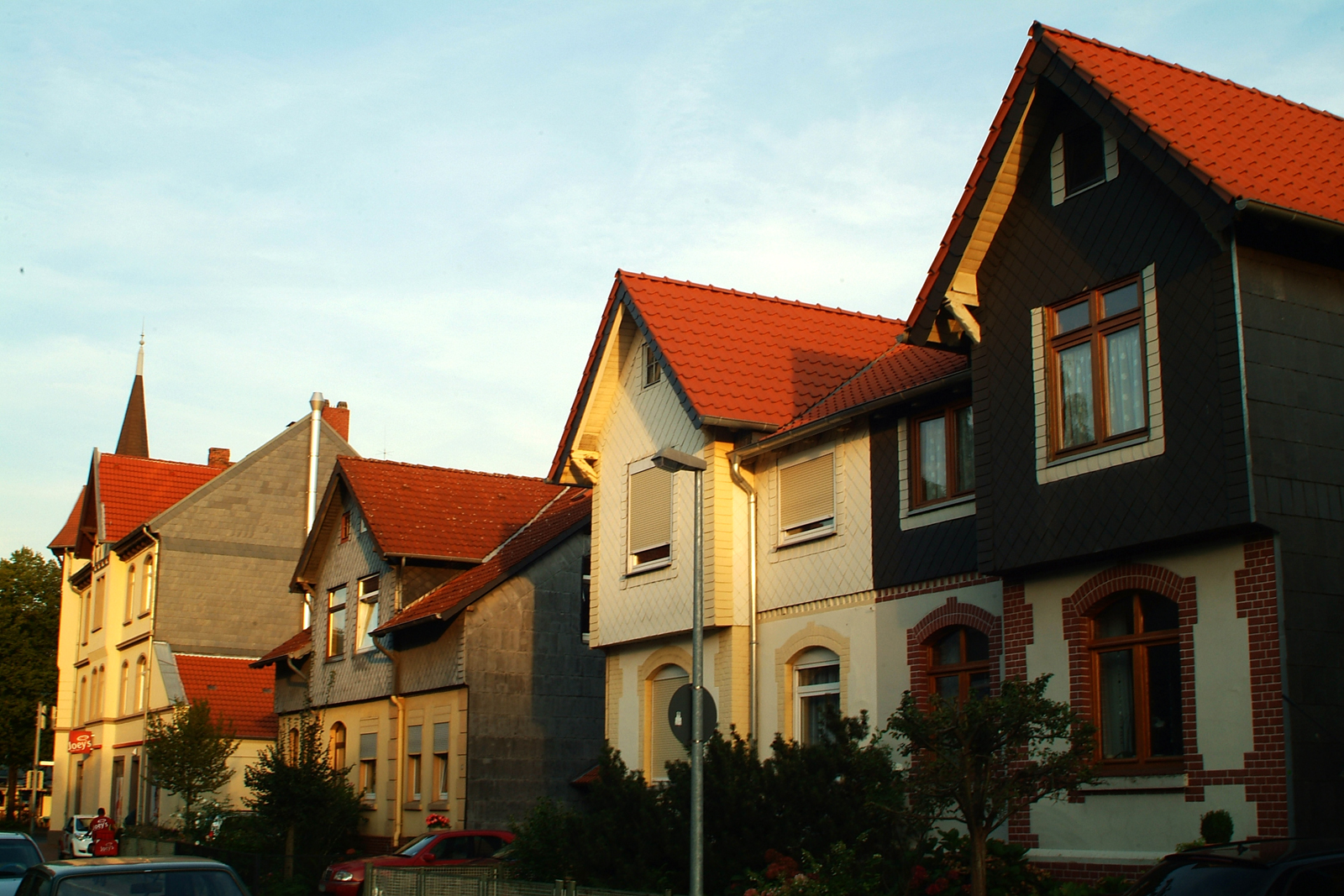 Blick durch die Schnabelstraße in Richtung Göttinger Chaussee: Die Doppelhäuschen im Vordergrund (Hausnummern 1, 3, 5 und 7) gehören zu weiteren denkmalgeschützten Gebäuden in der Schnabelstraße, die von 1900 bis 1913 errichtet wurden. Bauherr war die 1900 hauptsächlich von Arbeitern der ehemaligen Hannoverschen Waggonfabrik gegründete Baugenossenschaft Gemeinnütziger Bauverein Ricklingen.